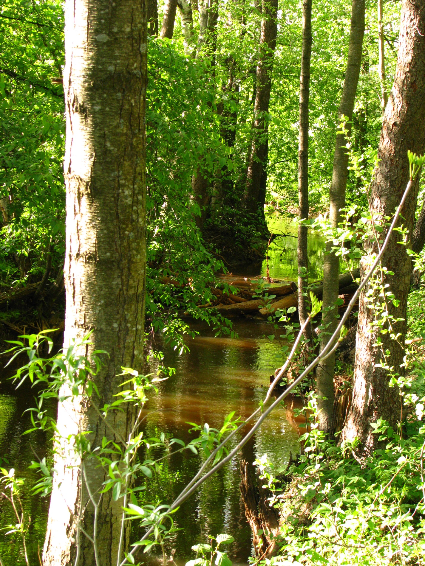 Новоорловский заказник: часть территории Ноаоорловского лесопарка между рекой Каменкой, Новоалександровской улицей, садовыми участками "Госрезерв" и "Светлана" и Орловским карьером,Санкт-Петербург,Приморский район, This image is related to the protected area of Russia number 7810038